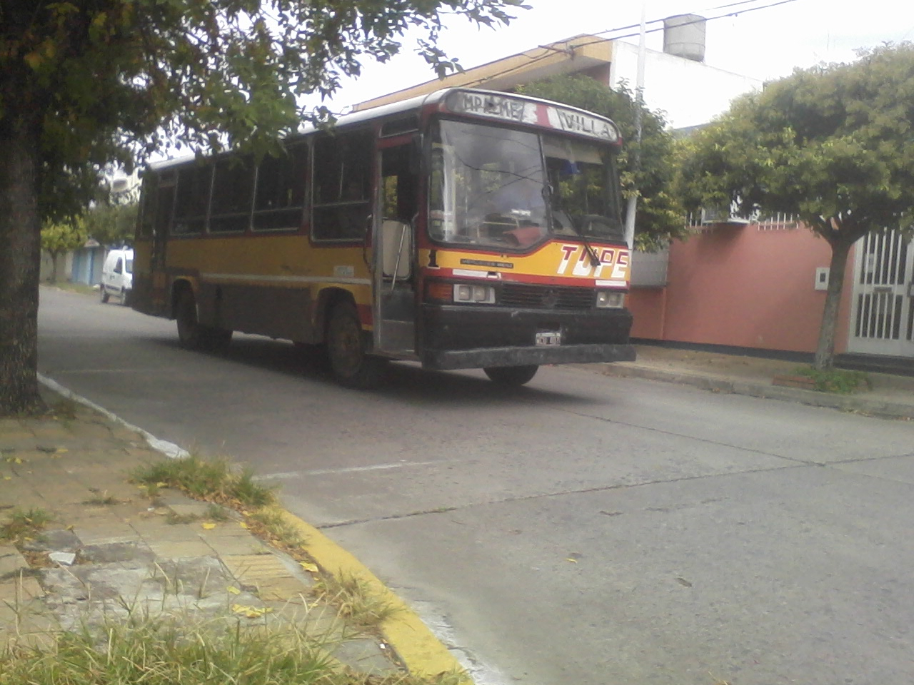 Mercedes Benz OF1214/45 carrozado por Corwin